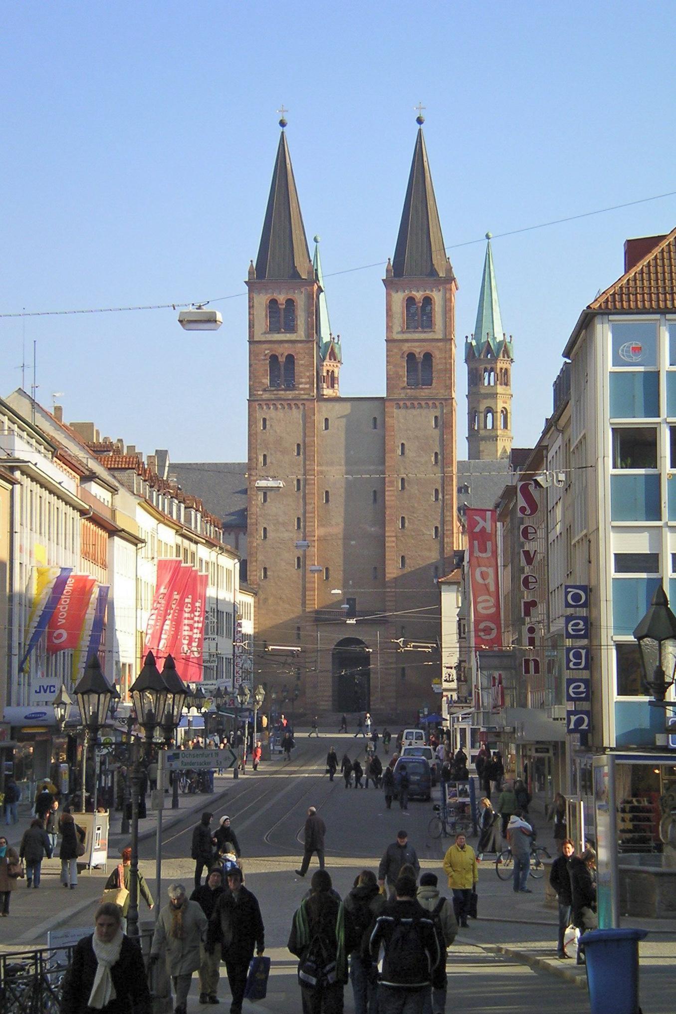 Die Westfassade des Würzburger Doms St. Kilian vor der Renovierung/Restaurierung im Laufe des Jahres 2006.